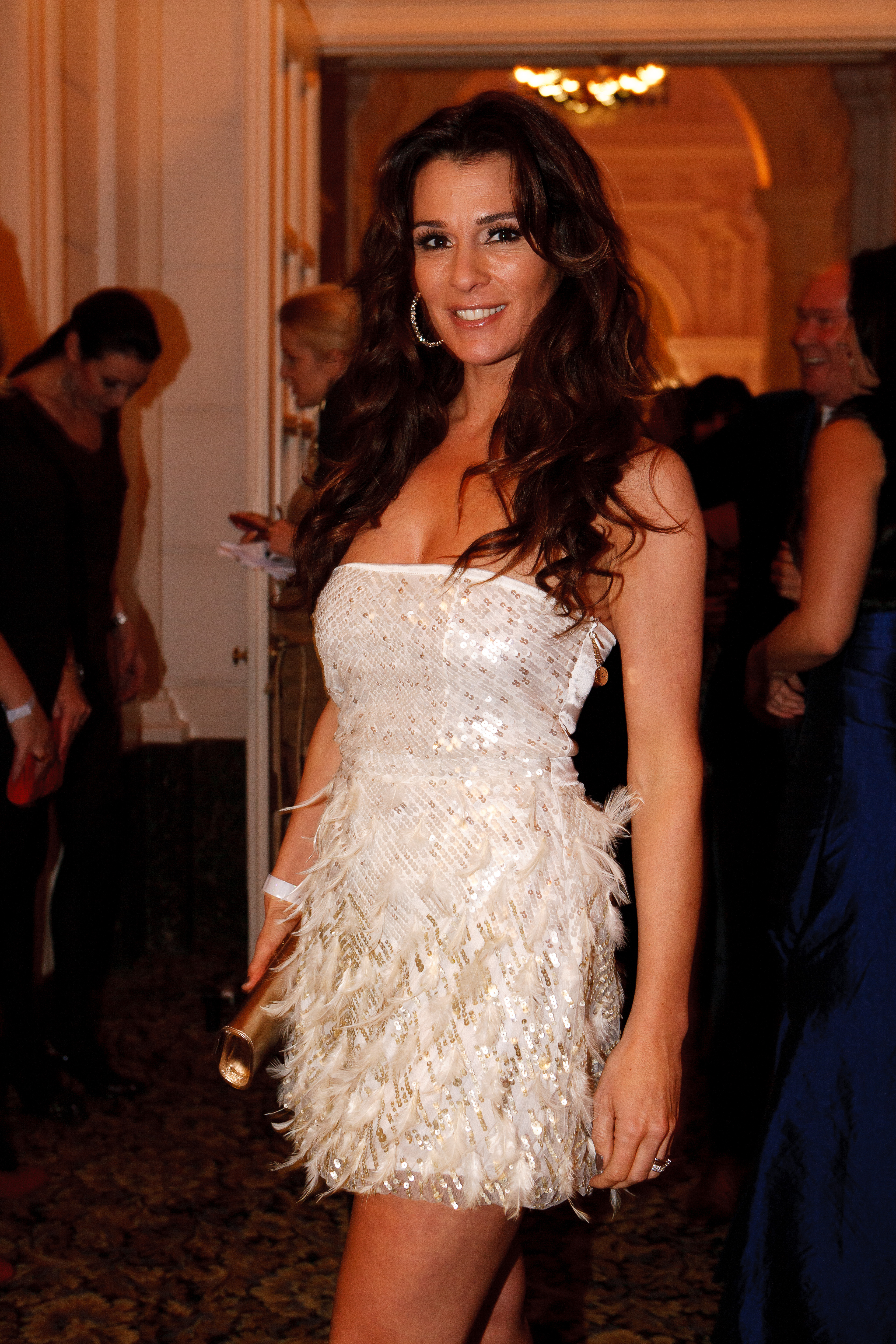 Foto: Roy Beusker